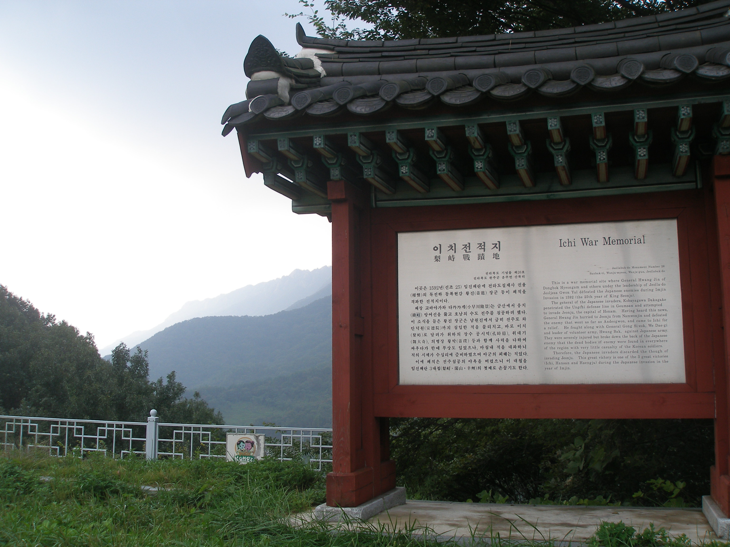 ichi battle memorial sign